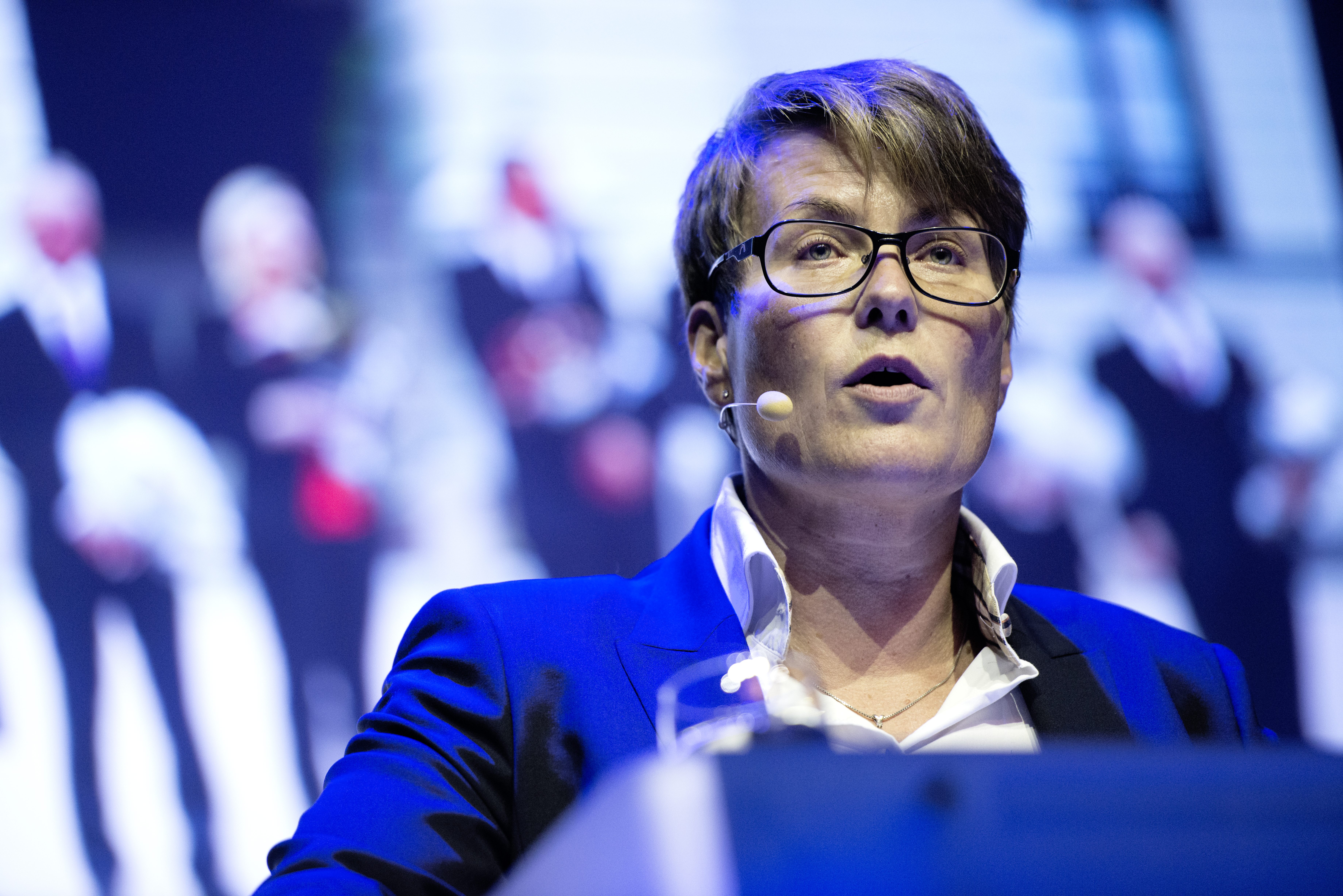 Tine Sundtoft på Zerokonferansen 2013 5. - 6. november.